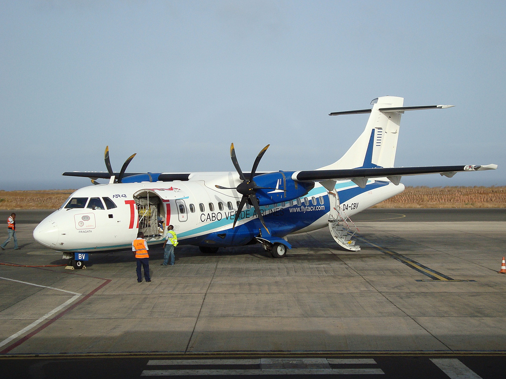 Het eerste stukje vloog ik met dit propellervliegtuig van Cabo Verde Airlines.